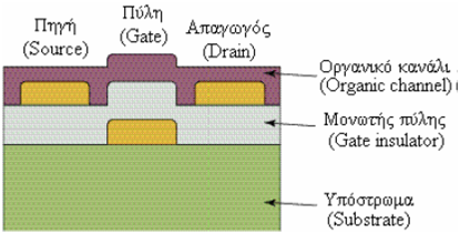 Οργανικό τρανζίστορ